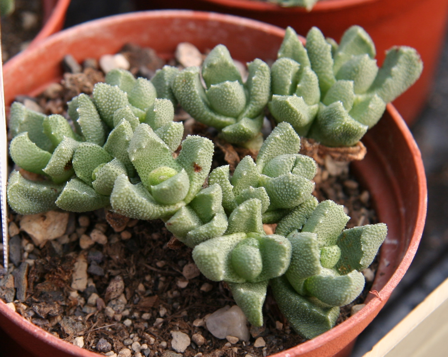 Stomatium mustellinum in Kultur bei Kakteen-Haage in Erfurt